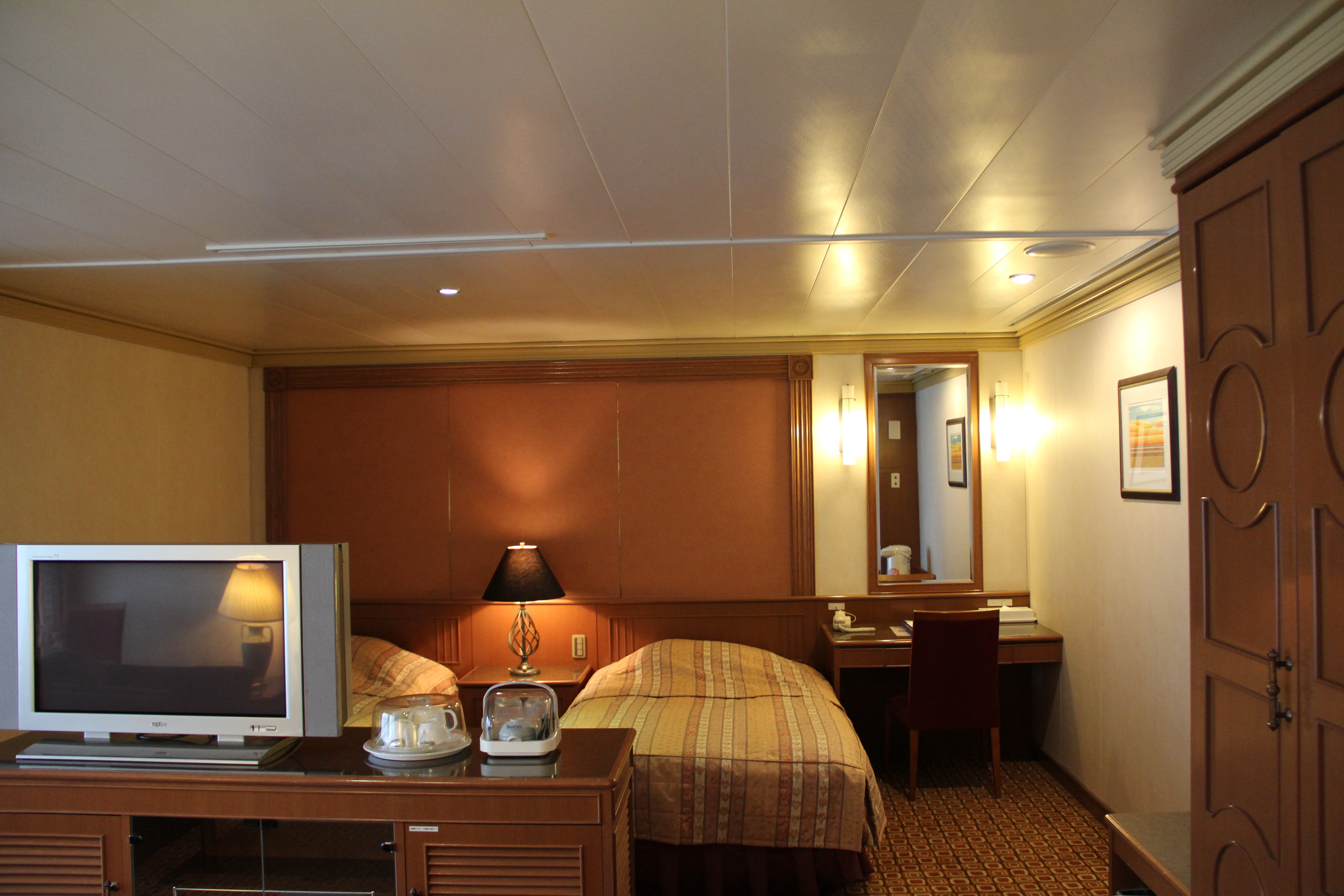 新仁保海フェリーゆうかりの寝室部分